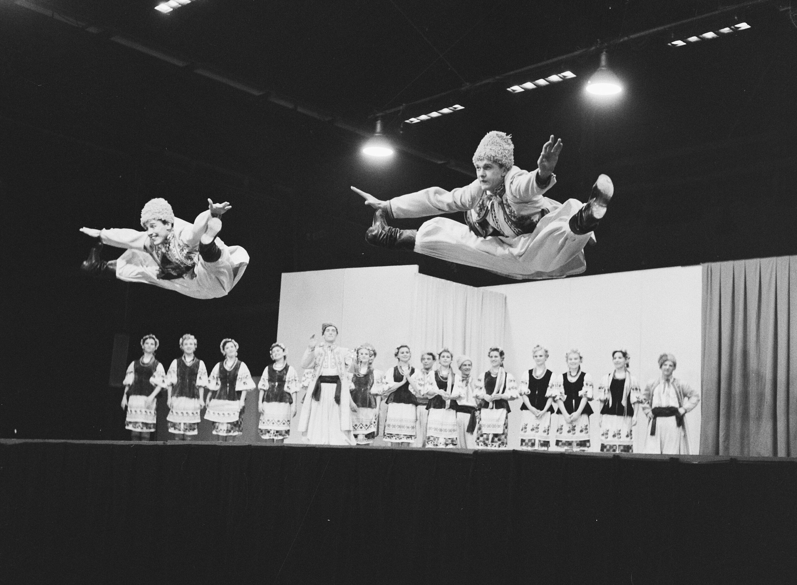 Collectie / Archief : Fotocollectie Anefo Reportage / Serie : [ onbekend ] Beschrijving : Optreden van het Moisejev Ballet uit Moskou in de Ahoy te Rotterdam Datum : 19 november 1960 Locatie : Rotterdam, Zuid-Holland Trefwoorden : ballet, dans Instellingsnaam : Ahoy, Morssejew Ballet Fotograaf : Behrens, Herbert / Anefo Auteursrechthebbende : Nationaal Archief Materiaalsoort : Negatief (zwart/wit) Nummer archiefinventaris : bekijk toegang 2.24.01.03 Bestanddeelnummer : 911-7965